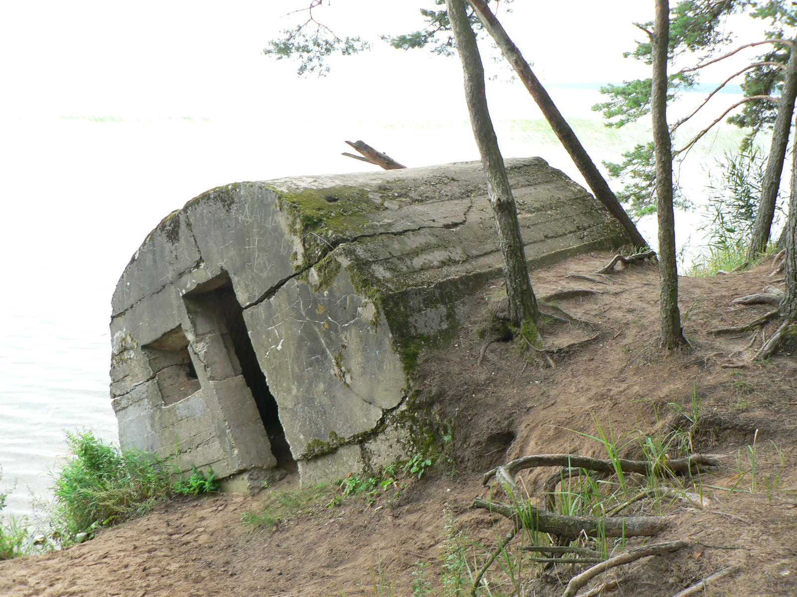 Niemiecki bunkier, z okresu I wojny światowej na płd. od półwyspu Nanosy, nad jeziorem Narocz (Białoruś). Беларуская (тарашкевіца): Нямецкі бункер часоў І сусьветнай вайны, на полдзень ад палувыспы Наносы, над возерам Нарач.